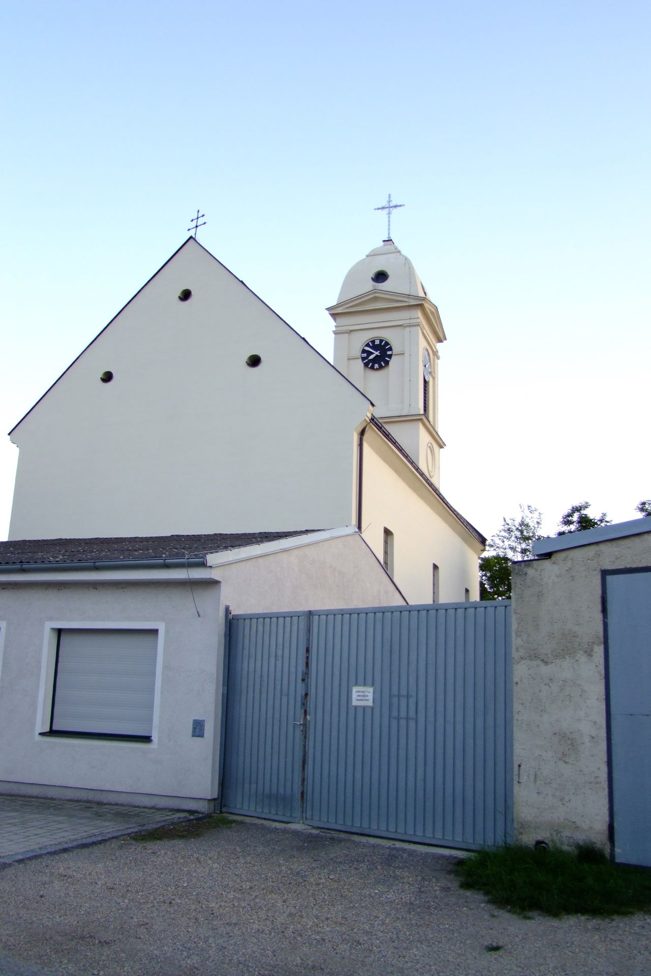 Evang. Pfarrkirche A.B.